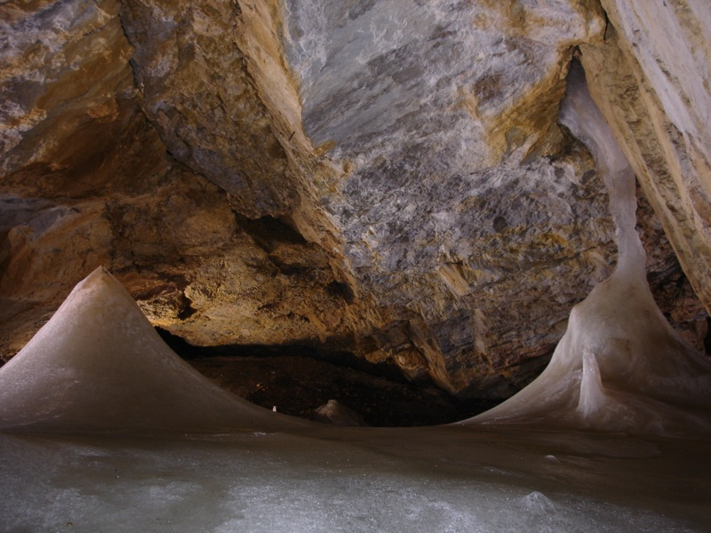 Dobšinská Ice Cave, Slovakia